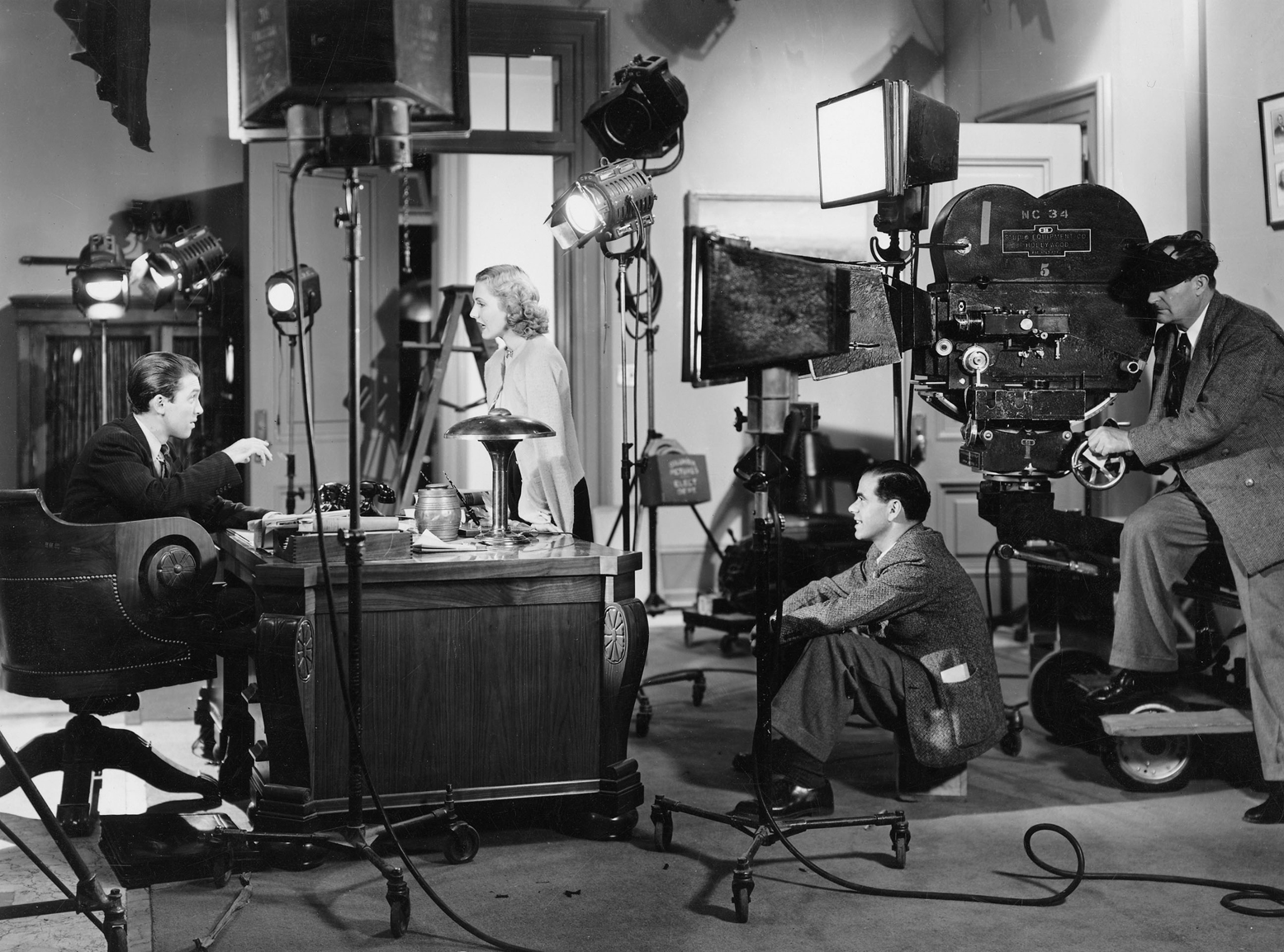 James Stewart, Jean Arthur, en Frank Capra op de set Mr. Smith Goes to Washington (1939). Arthur is wearing a costume designed by costume designer Robert Kalloch.